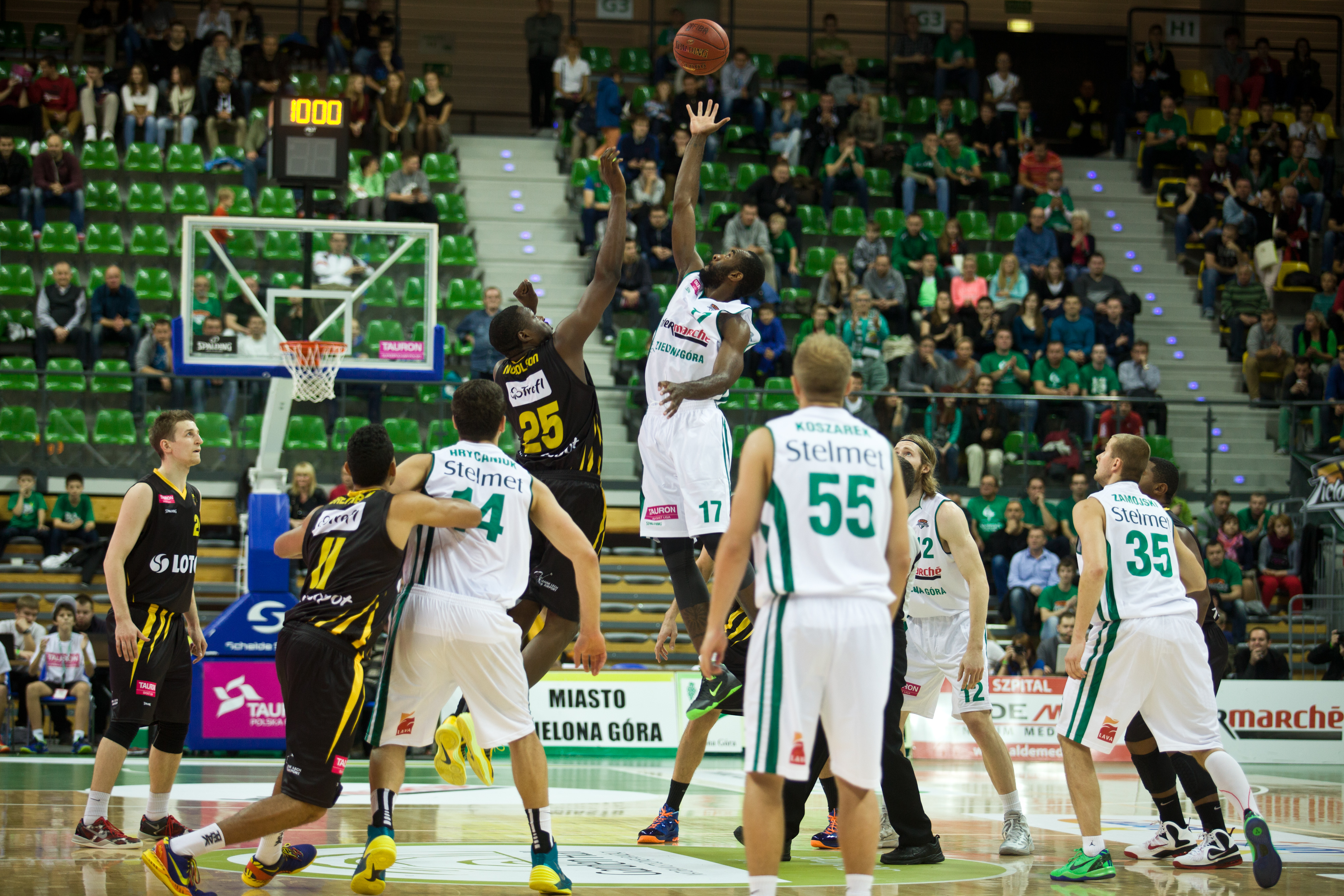 Stelmet Zielona Góra - Treﬂ Sopot. Tauron Basket Liga